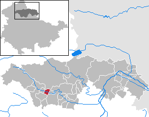 Bellstedt in Thuringia - Kyffhäuserkreis